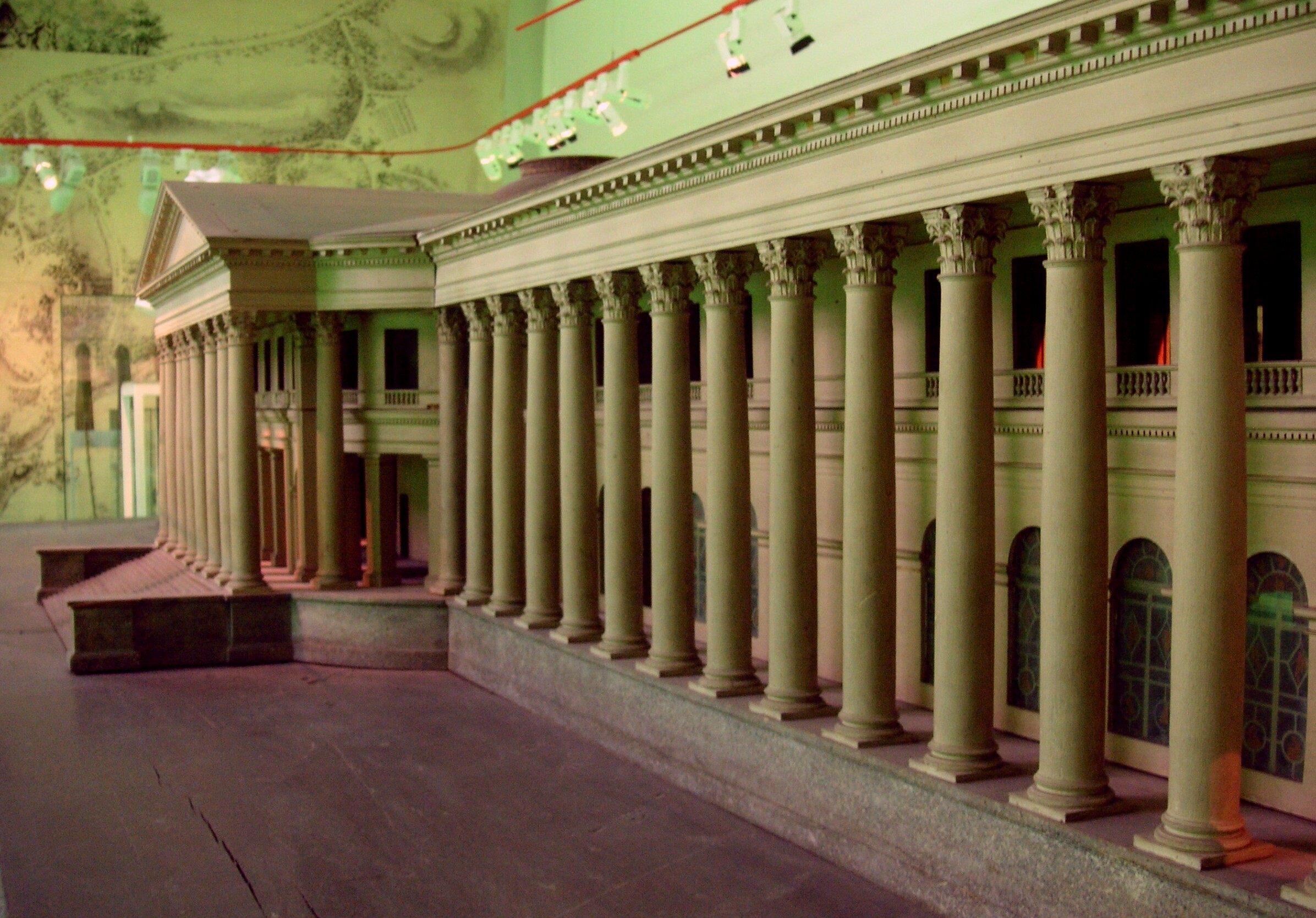 Stora Haga slott, modellfoto